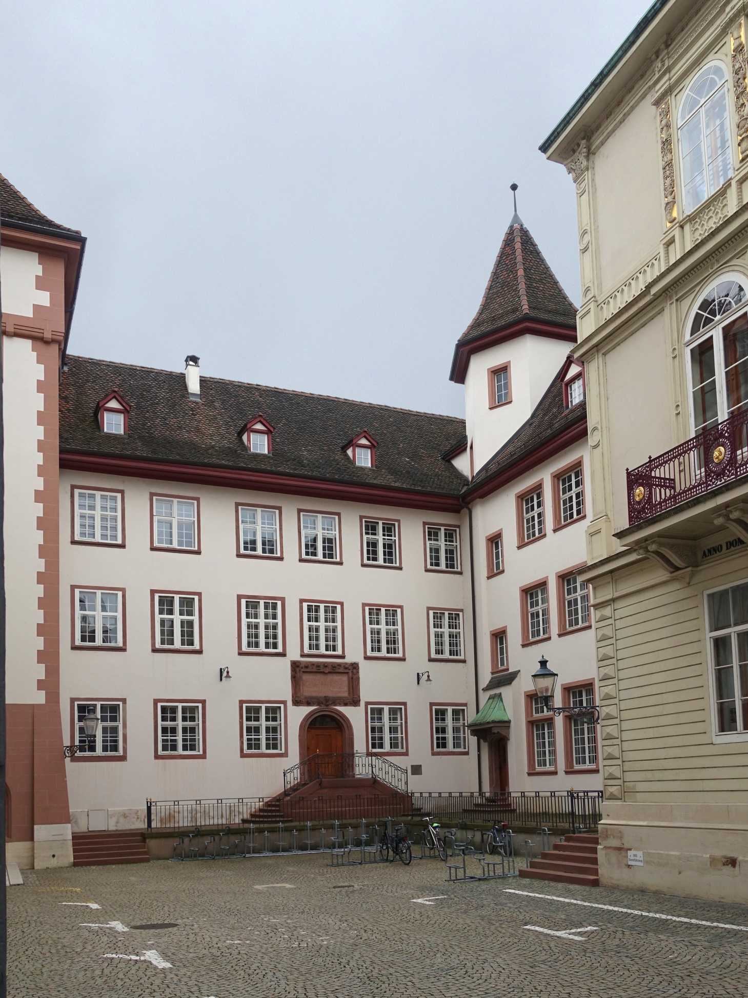 Jakob Christoph Blarer von Wartensee (1542–1608) Fürstbischof im Bistum Basel. Domhof erbaut 1578 für den Schaffner des Domstiftes